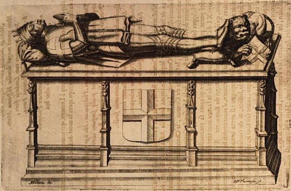 Náhrobek Filipa II. Savojksého v Hautecombe